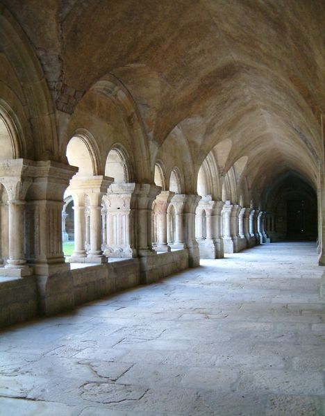 Cloître de l'abbaye, Bourgogne, FRANCE